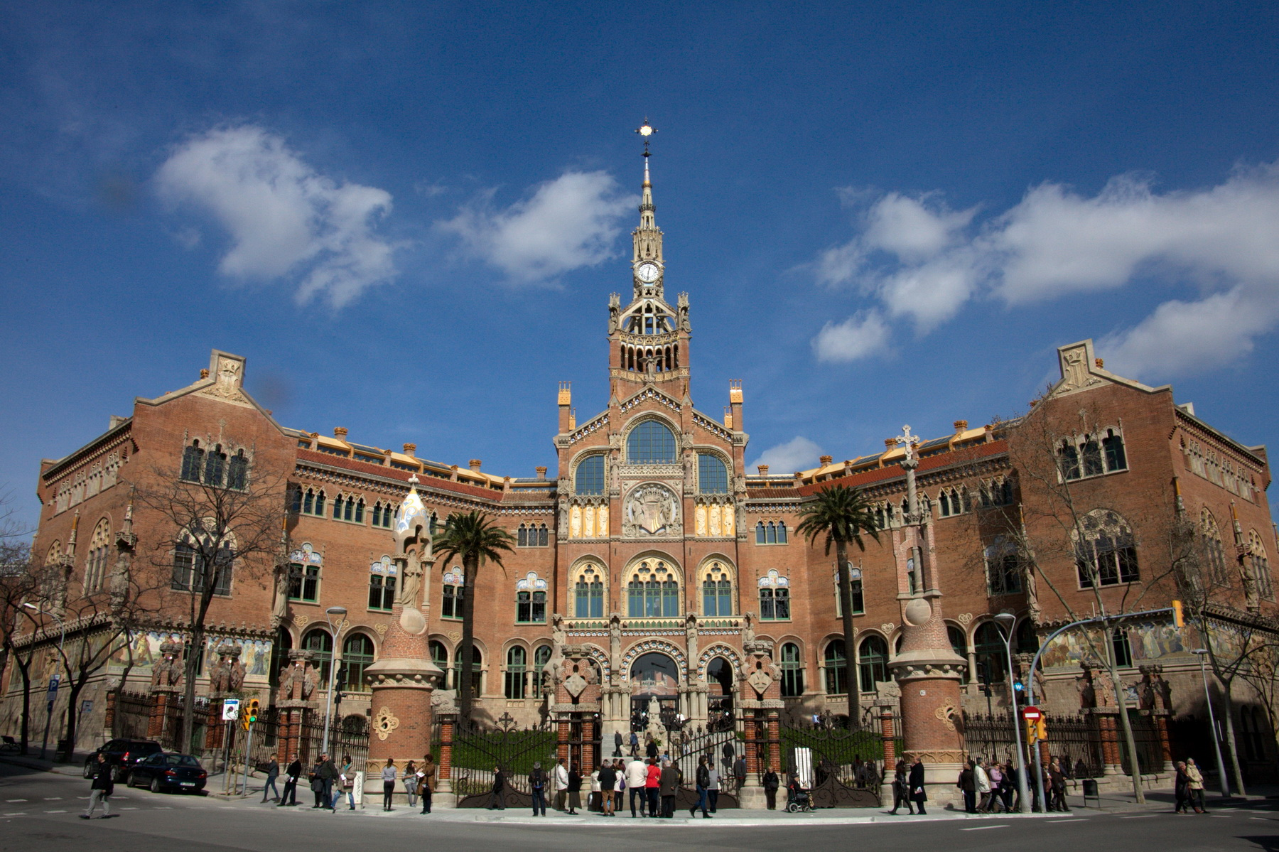 Vista general de l'edifici després de la restauració del conjunt de 2013. Jornada de portes obertes, març-2014